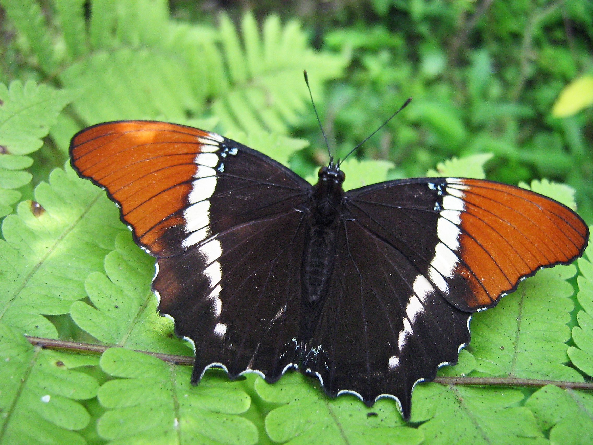 Siproeta epaphus - Jardin Botanico del Quindio